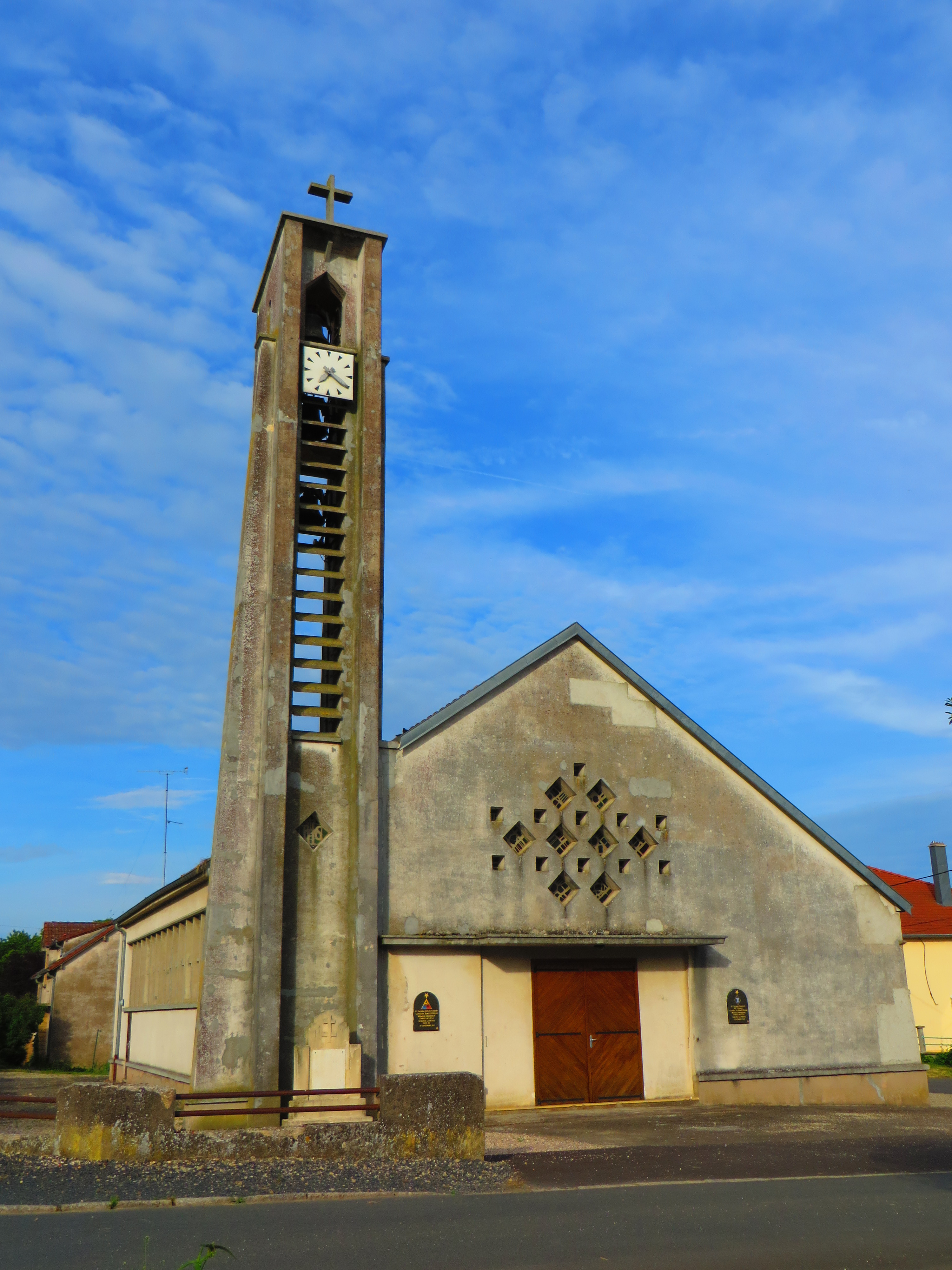 Bezange Petite eglise